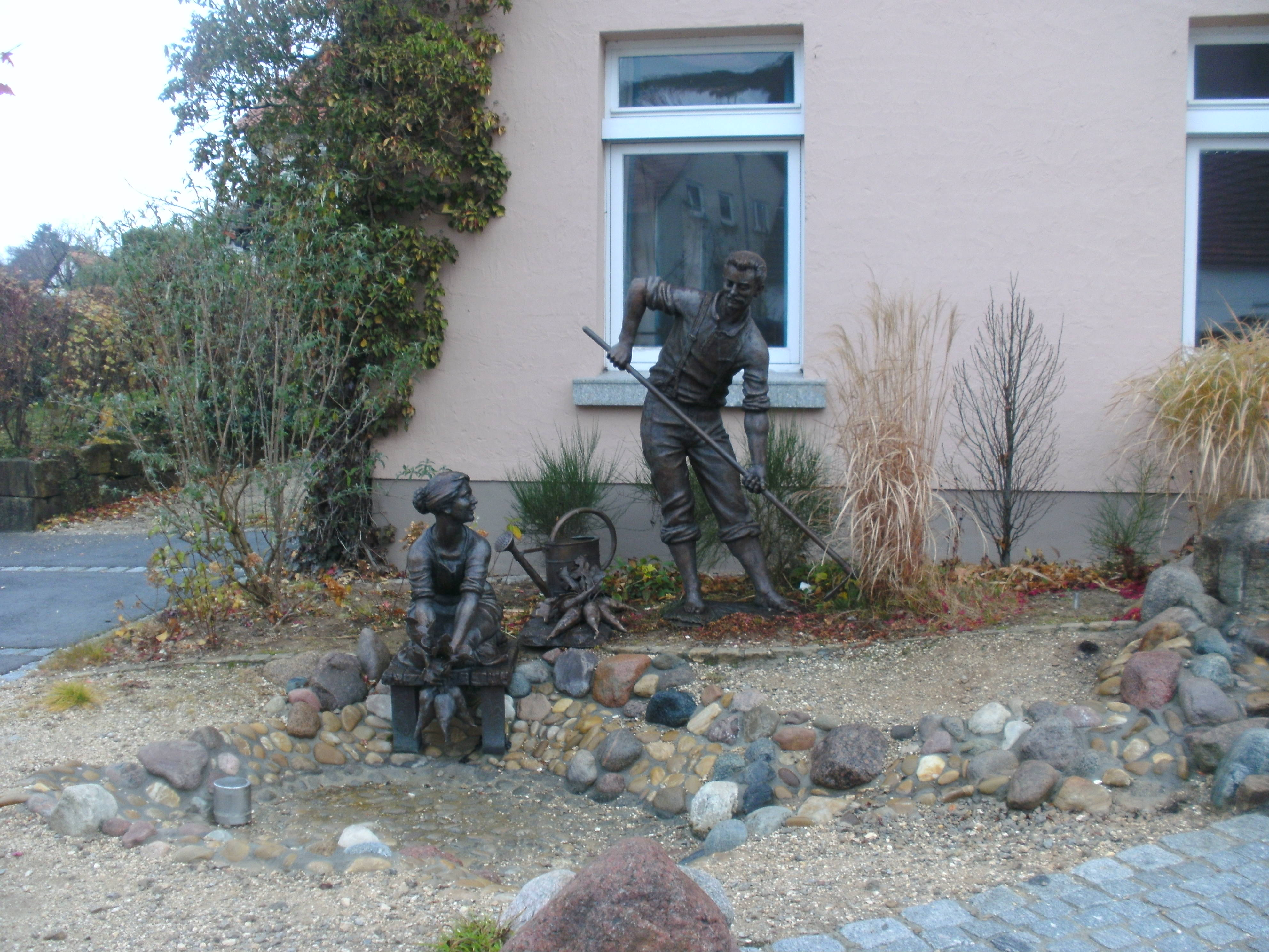 Der Gärtnerbrunnen in der Ortsmitte des Heubacher Stadtteiles Lautern